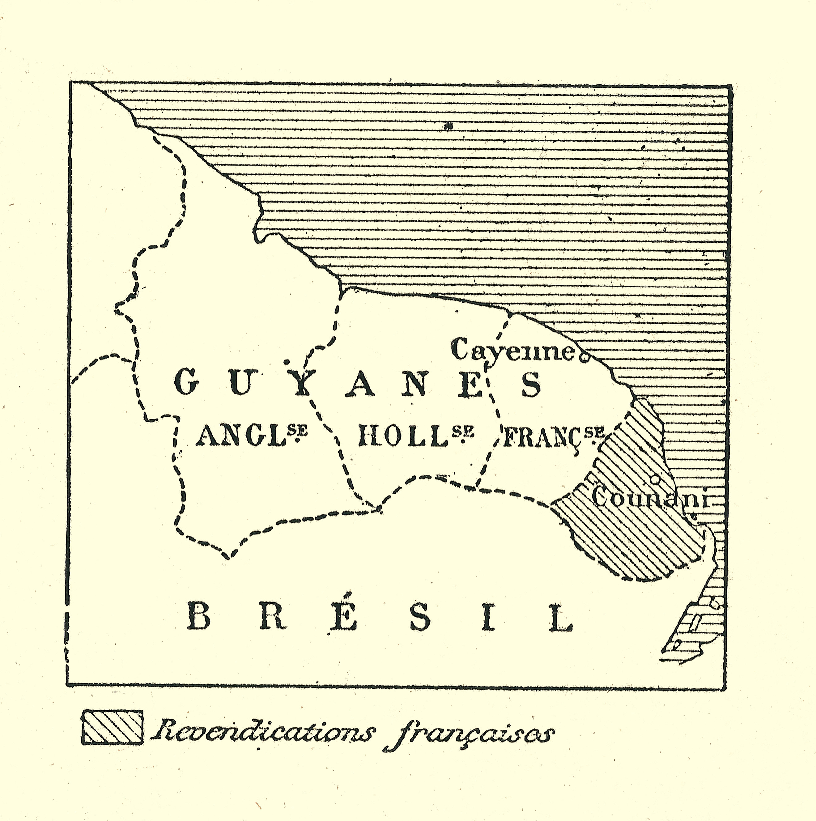 Carte de Franz Schrader